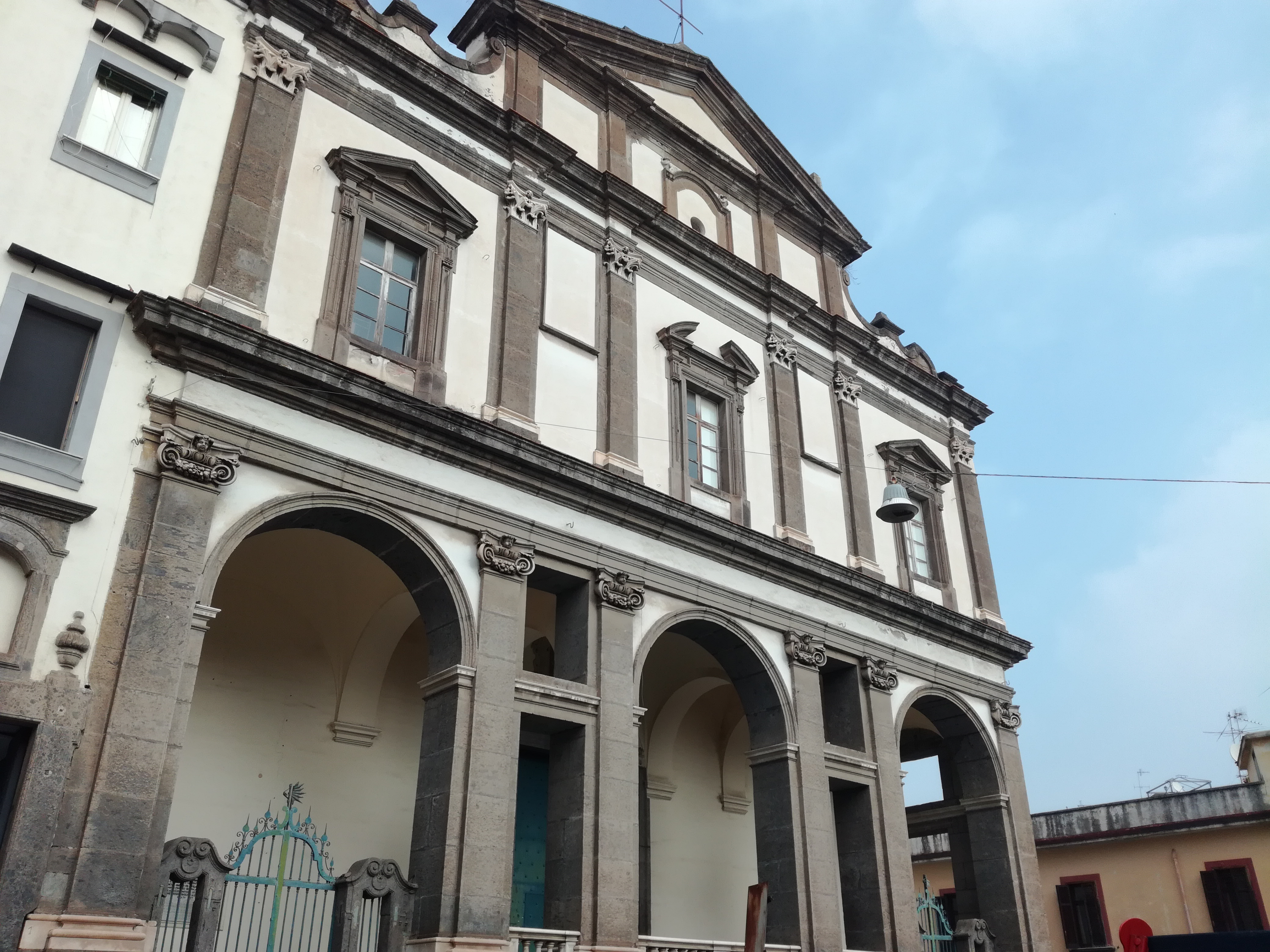 Chiesa di Santa Maria della Stella (Napoli)